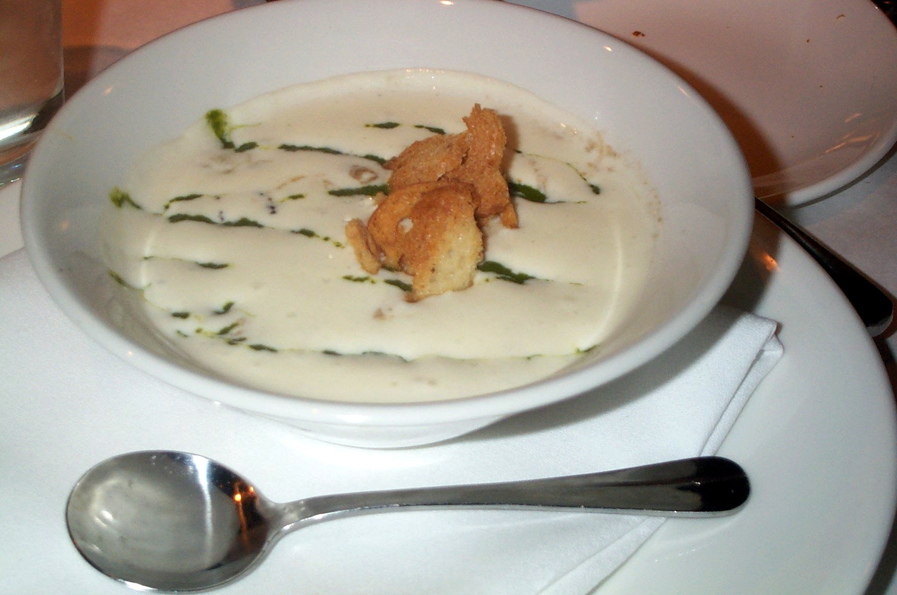 celeriac soup